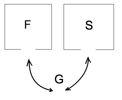 Иллюстрирование теоремы